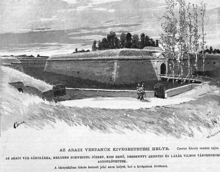 A golyó általi halálra ítélt aradi vértanúk kivégzésének helye, a Vasárnapi Ujság illusztrációja